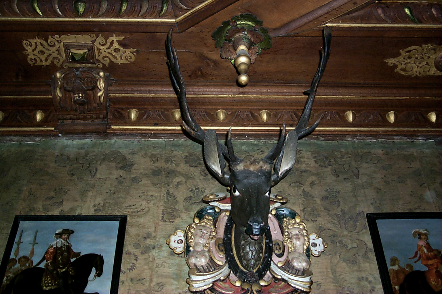 Antler from 1611 at Rosenborg Castle.